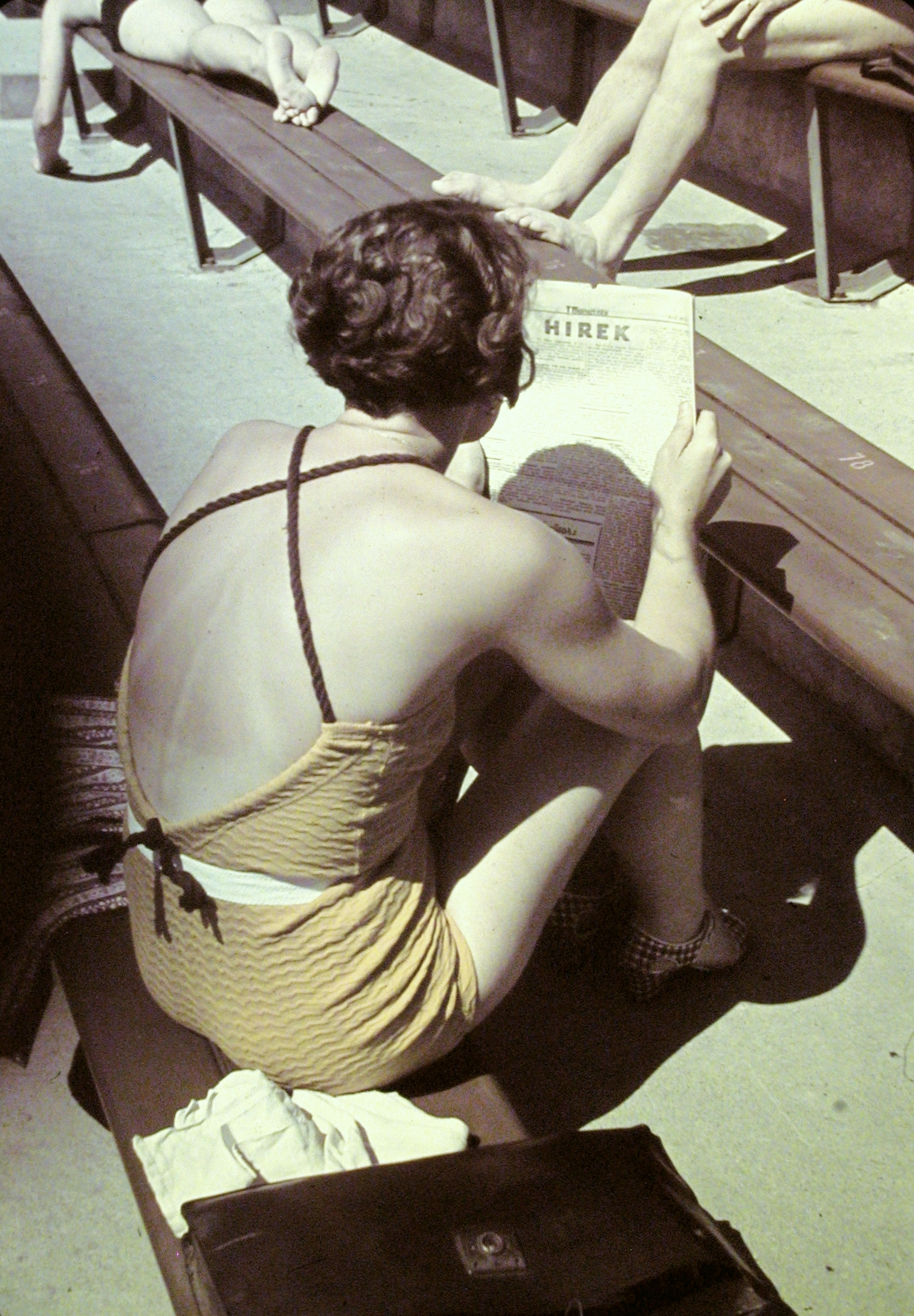 Hajós Alfréd Nemzeti Sportuszoda.This Agfacolor photo (invention from 1936) was not colorized. Hirek is News (english). Location: Hungary, Budapest, Margit Islands Tags: Agfacolor, colorful, color, bathing suit, newspaper, girl, genre painting, auditorium, briefcase Title: Hajós Alfréd Nemzeti Sportuszoda.